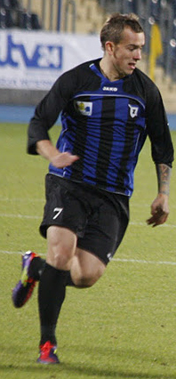 Patryk Klofik podczas meczu I ligi pomiędzy Zawiszą Bydgoszcz, a Wartą Poznań.